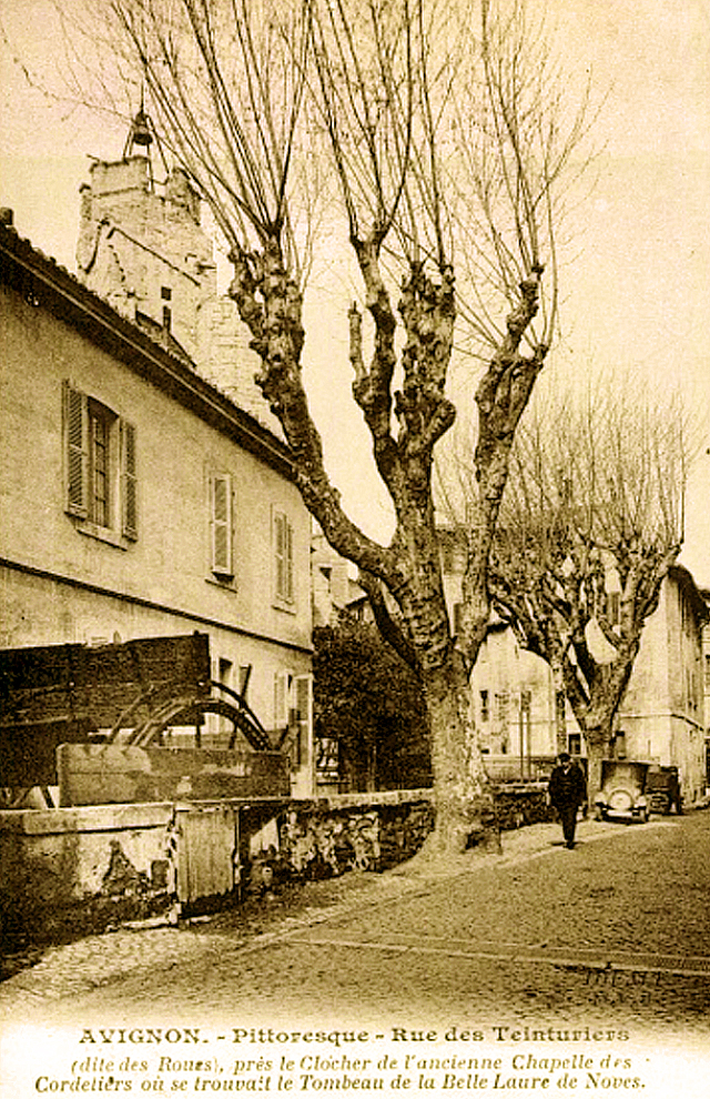 Le clocher des Cordeliers vu de la rue des Teinturiers